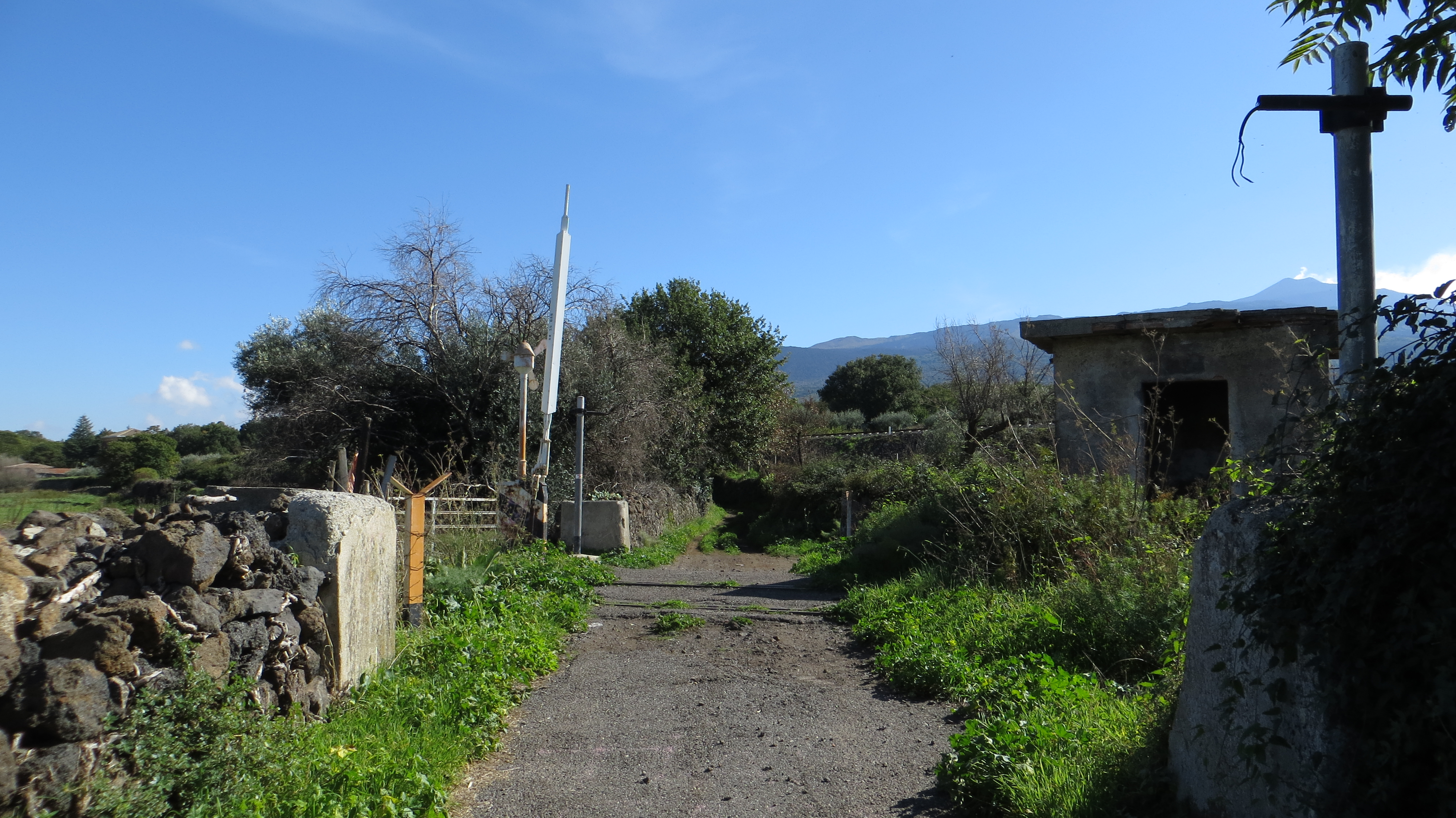 Passaggio a livello FS. Parallello alla nuova variante F.C.E.